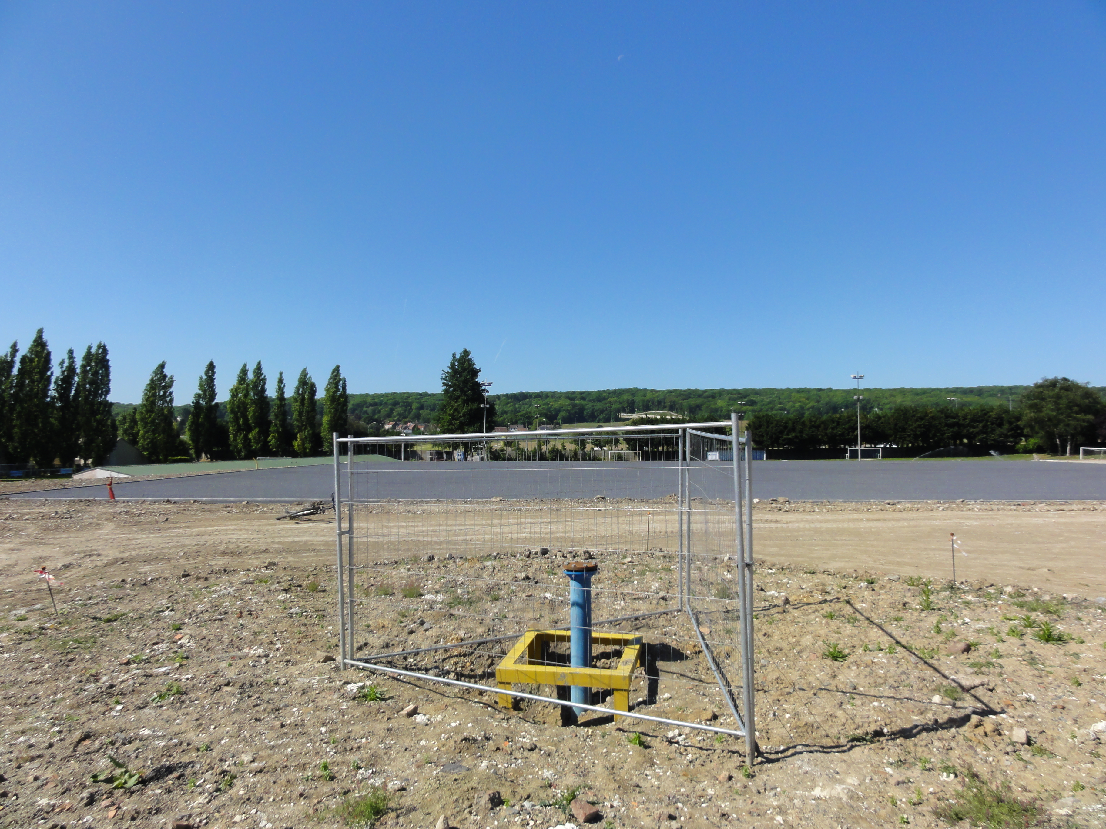 La Fosse n° 1 - 1 bis de la Compagnie des mines de Vimy-Fresnoy était un charbonnage constitué de deux puits situé à Vimy, Pas-de-Calais, Nord-Pas-de-Calais, France.